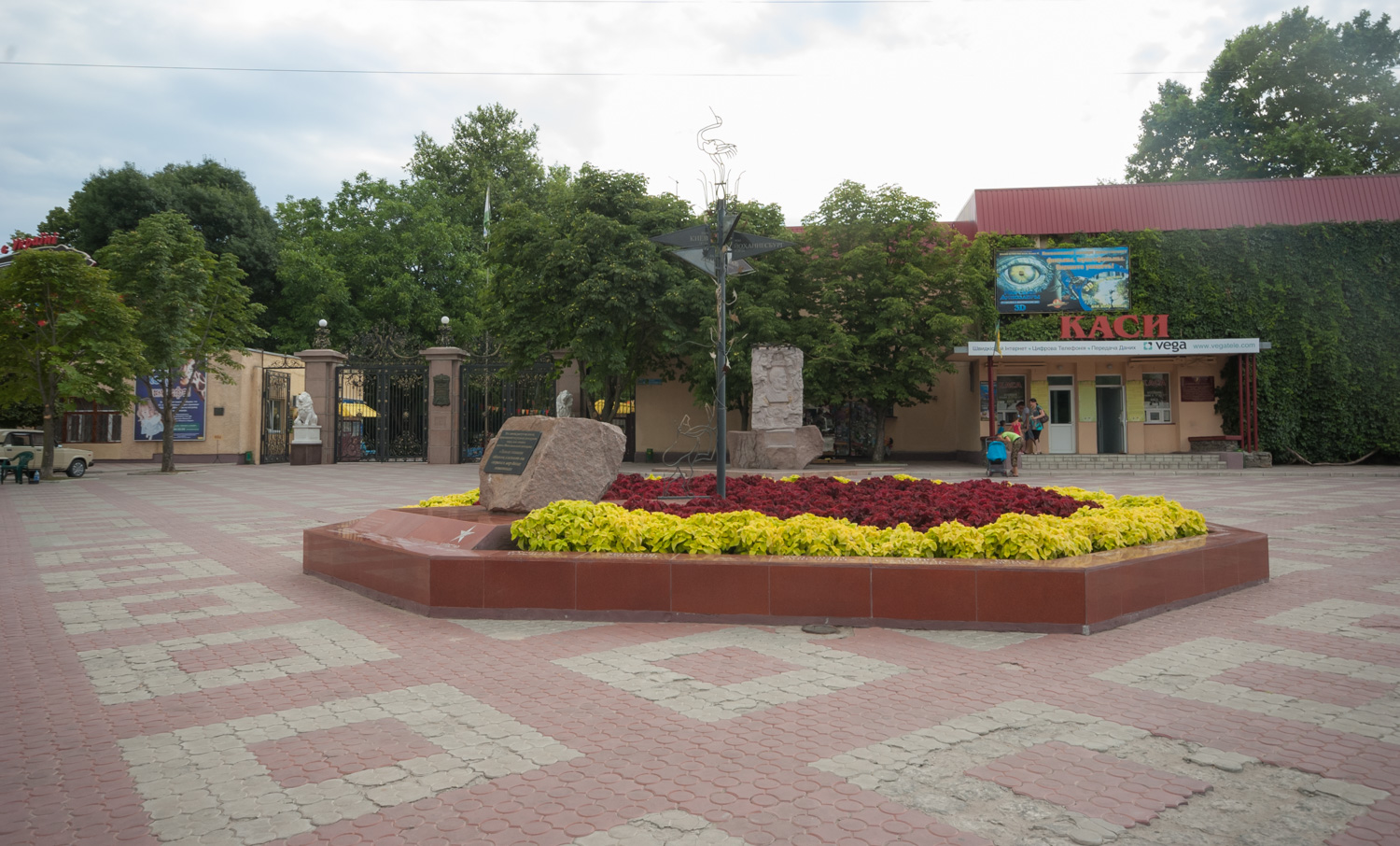 Миколаївський зоопарк, м. Миколаїв